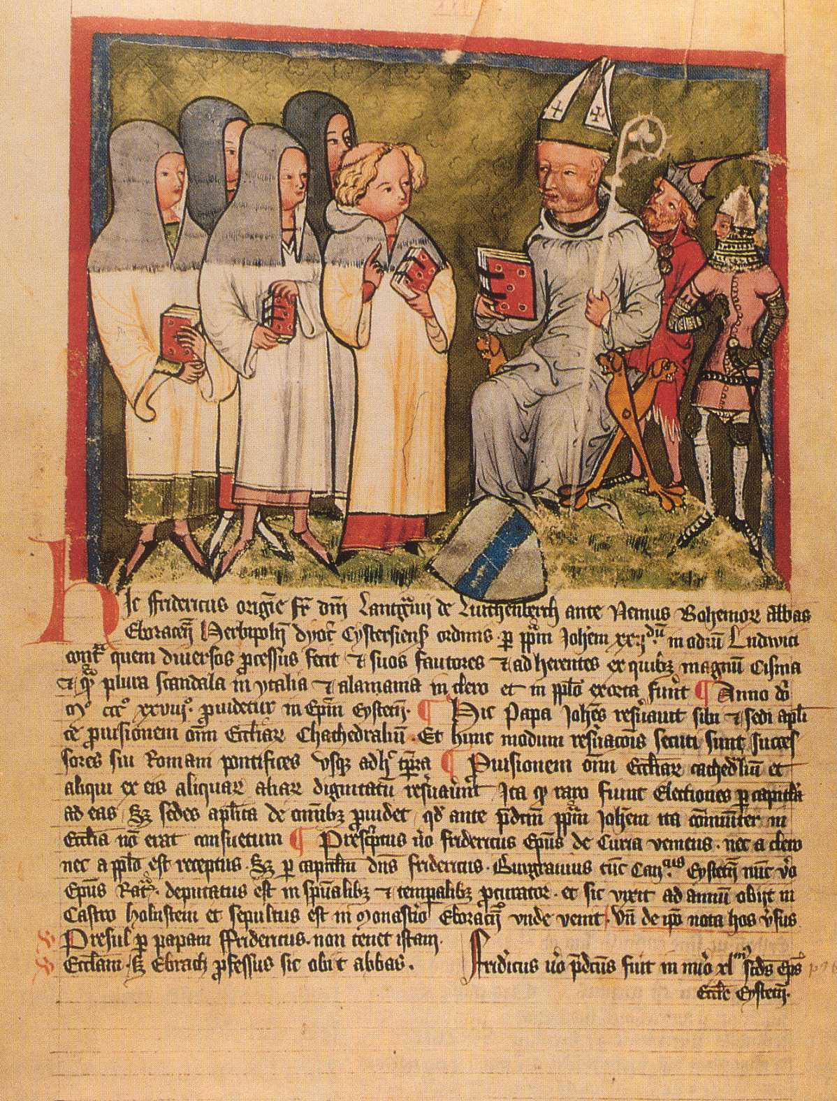 Seite mit Miniatur aus dem Gundekarianum, Friedrich III. von Leuchtenberg, Bischof von Eichstätt, mit Klerikern zeigend